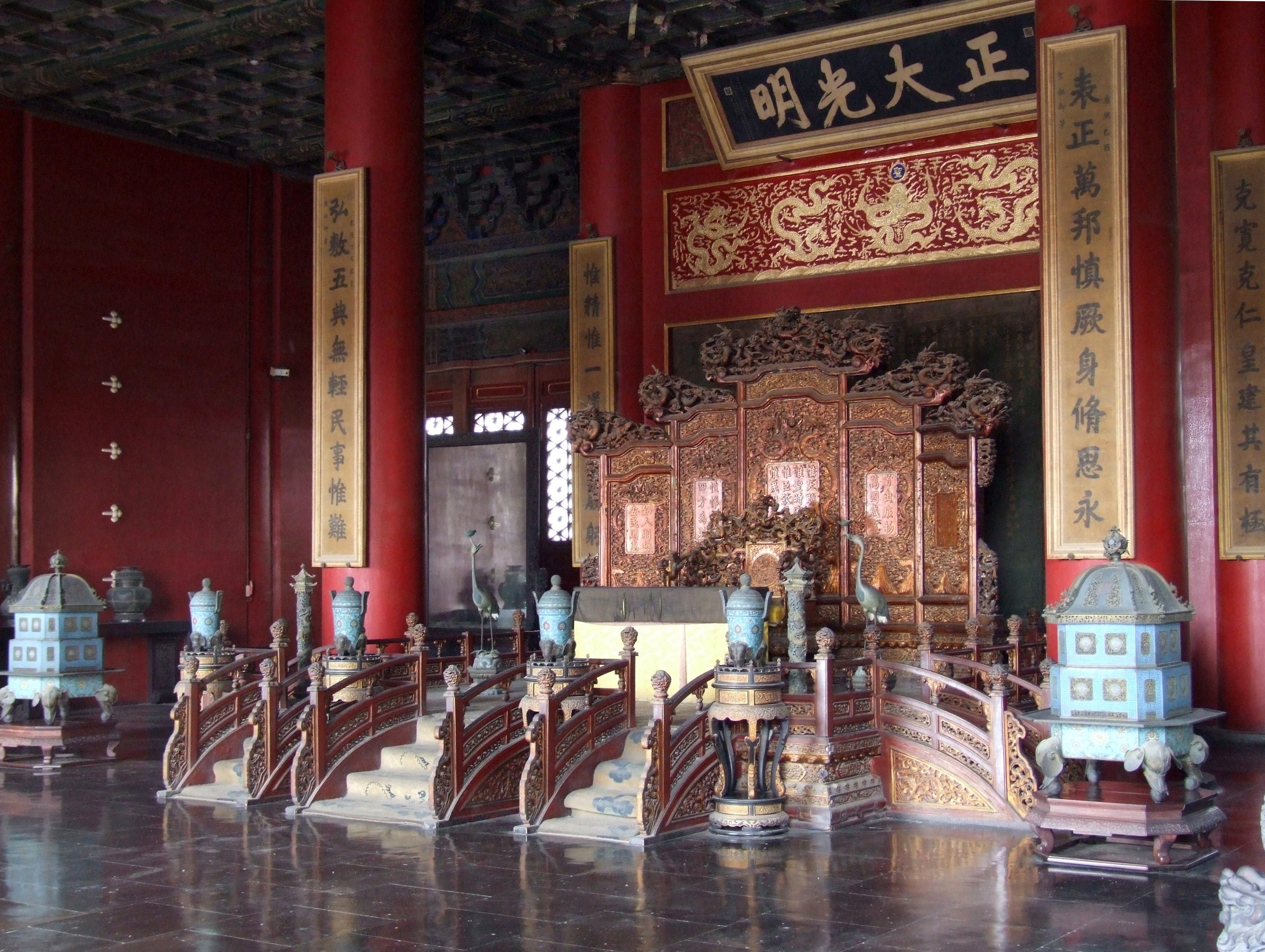 Verbotene Stadt